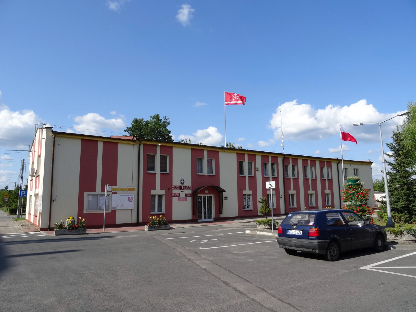 Budynek, w którym mieści się Urząd Gminy, Rada Gminy i Wójt Gminy Nowa Wieś Wielka, powiat bydgoski